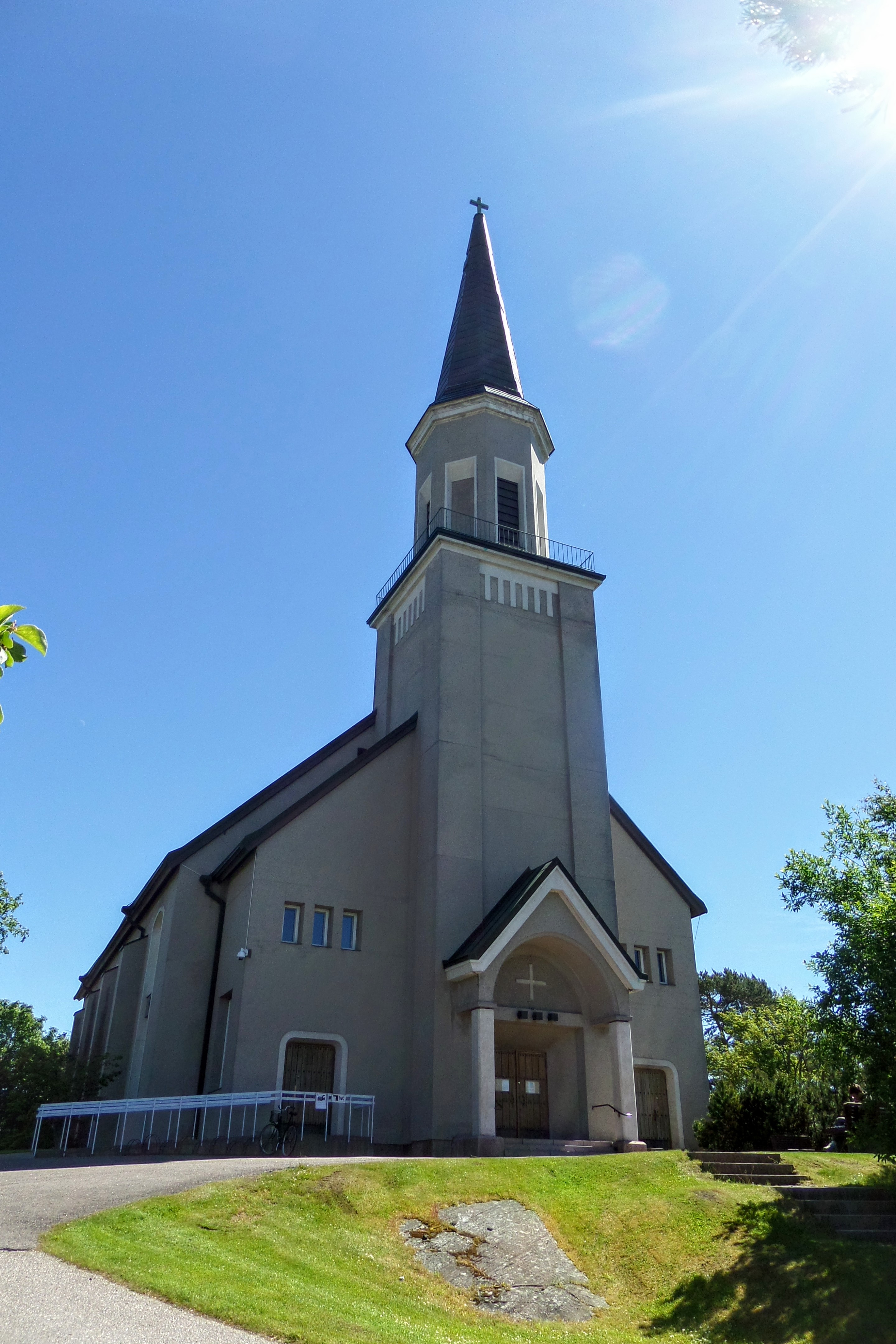 Kuva Hangon kirkosta.